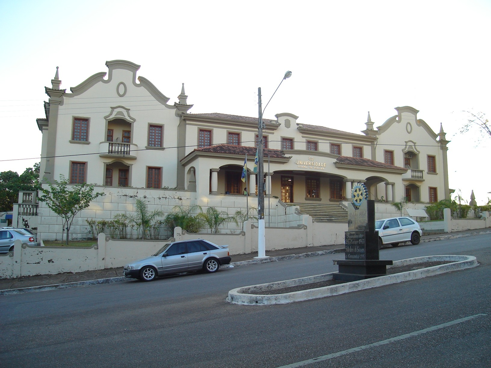 Prédio da Universidade Federal de Rondônia (UNIR). Autor: Filipe Mesquita de Oliveira